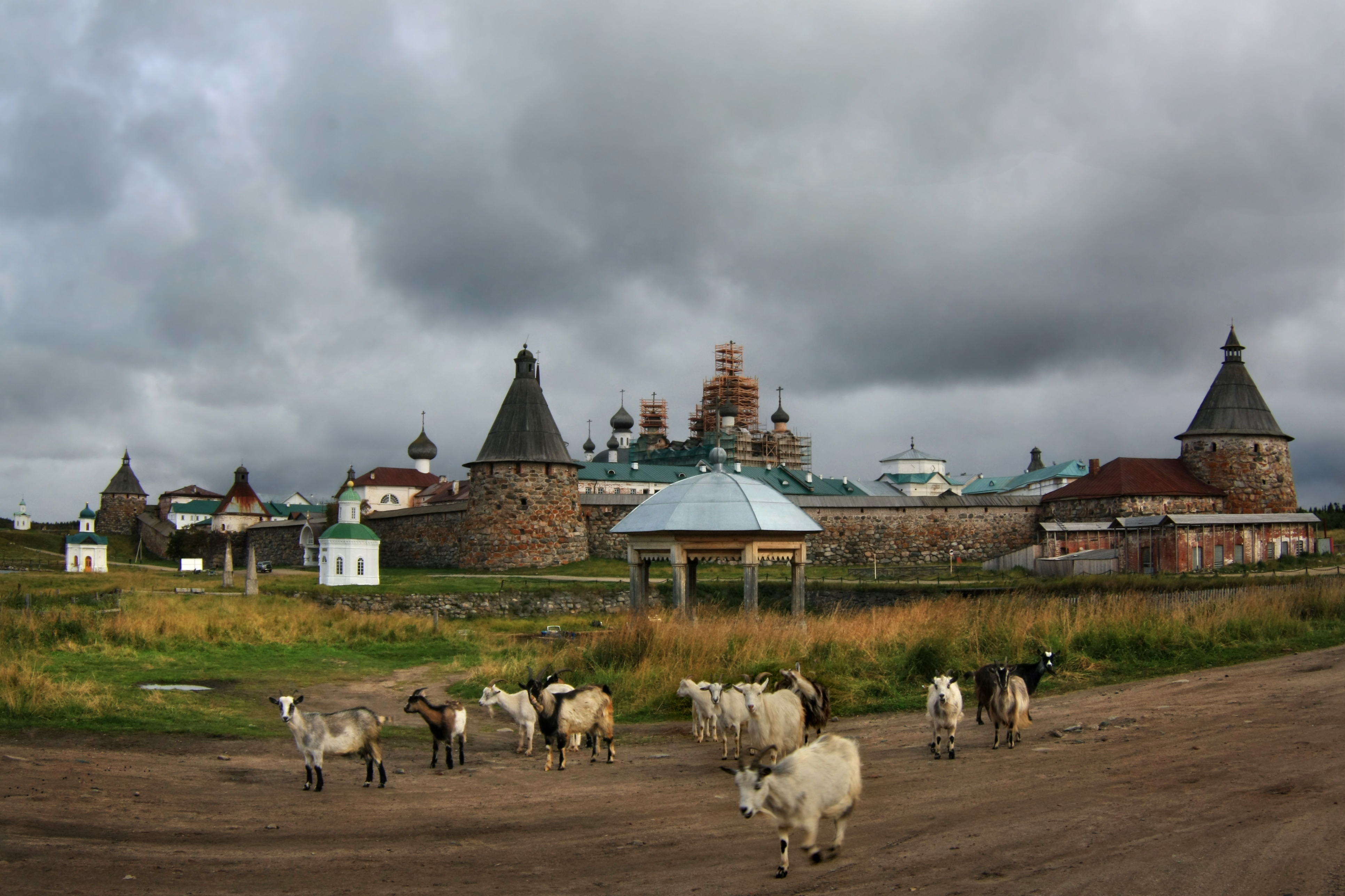 Kitsekari külatänaval, tagaplaanil Solovetsi kreml